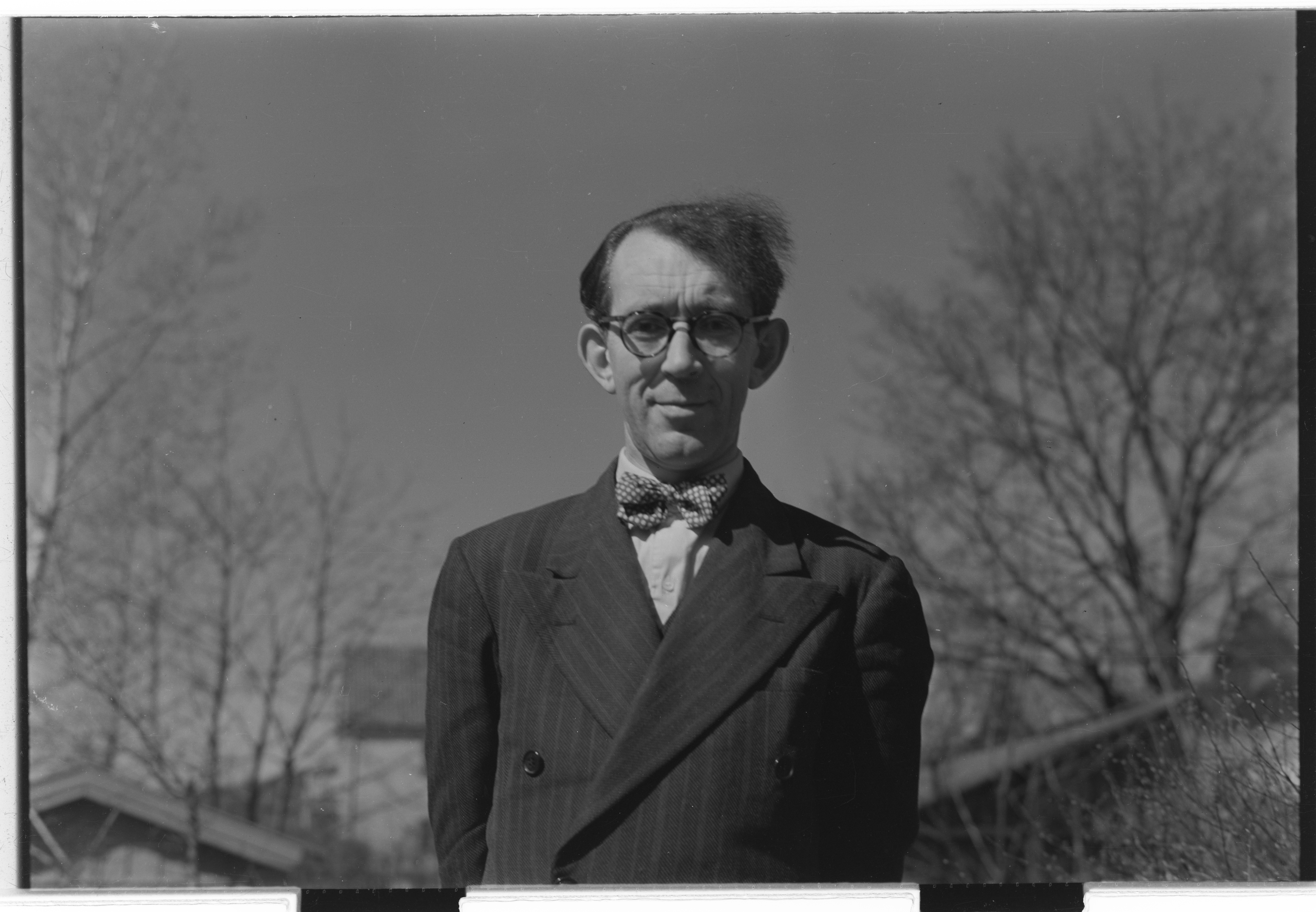 Bildet er hentet fra Arkivverket. Professor Gutorm Gjessing, født 14.04.1906, død 27,04.1979. Han var styrer for Etnografisk museum fra 1947 til 1973. Arkivinstitusjon : Riksarkivet Arkivnavn : Billedbladet NÅ Sted : Norge, Ukjent, Ukjent, Emneord: Menn, Norske etnografer, Norske arkeologiprofessorer Avbildet: Gjessing, Gutorm